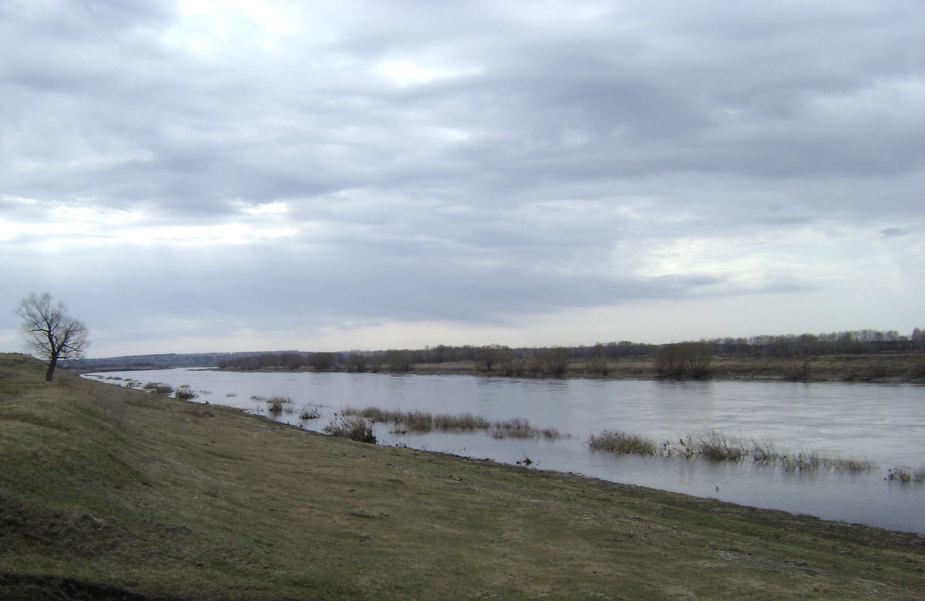 Весенний разлив реки Дон напротив Горожанки (Рамонский район, Воронежская обл., Россия). Левый берег.